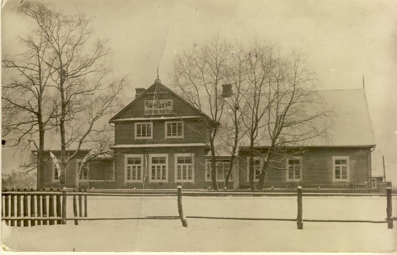 Kupiškio vidurinė mokykla 1931 metais